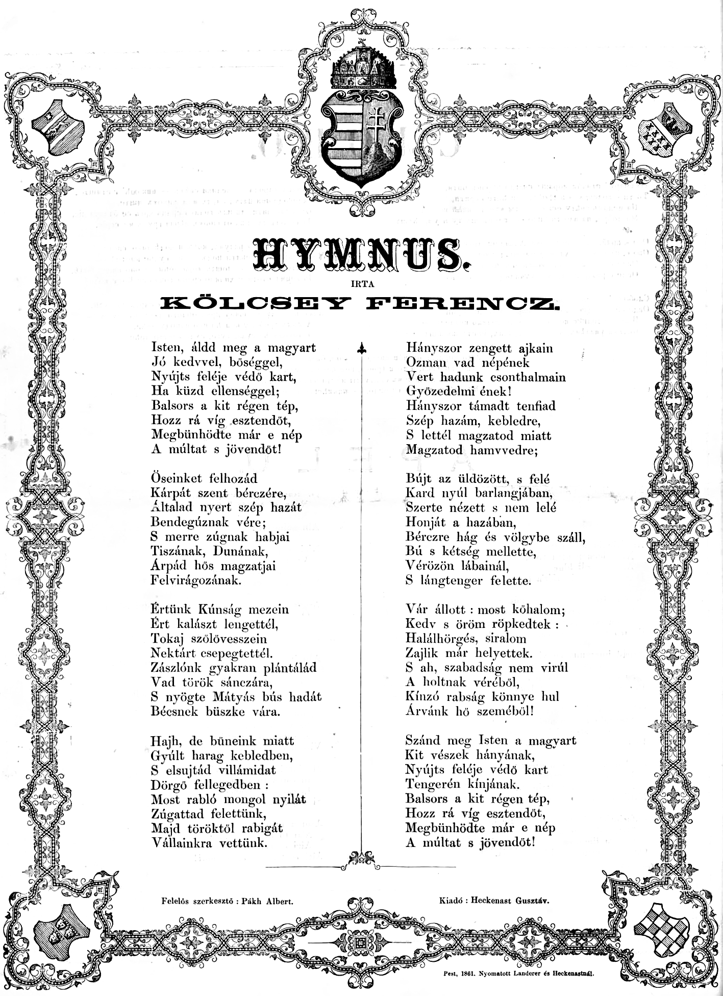 Kölcsey Ferenc: Himnusz. A Vasárnapi Ujság egyik oldala 1861. 1. szám.